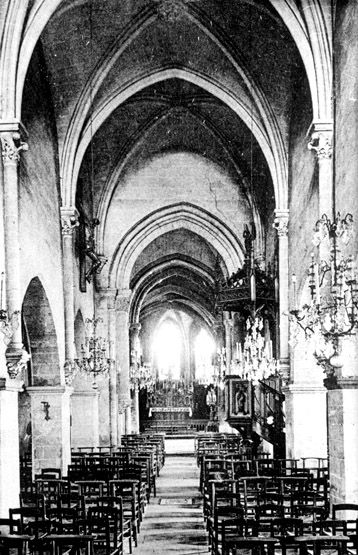 Nef, vue vers l'est, au début du XXe siècle, avec les voûtes néo-gothiques des années 1870.